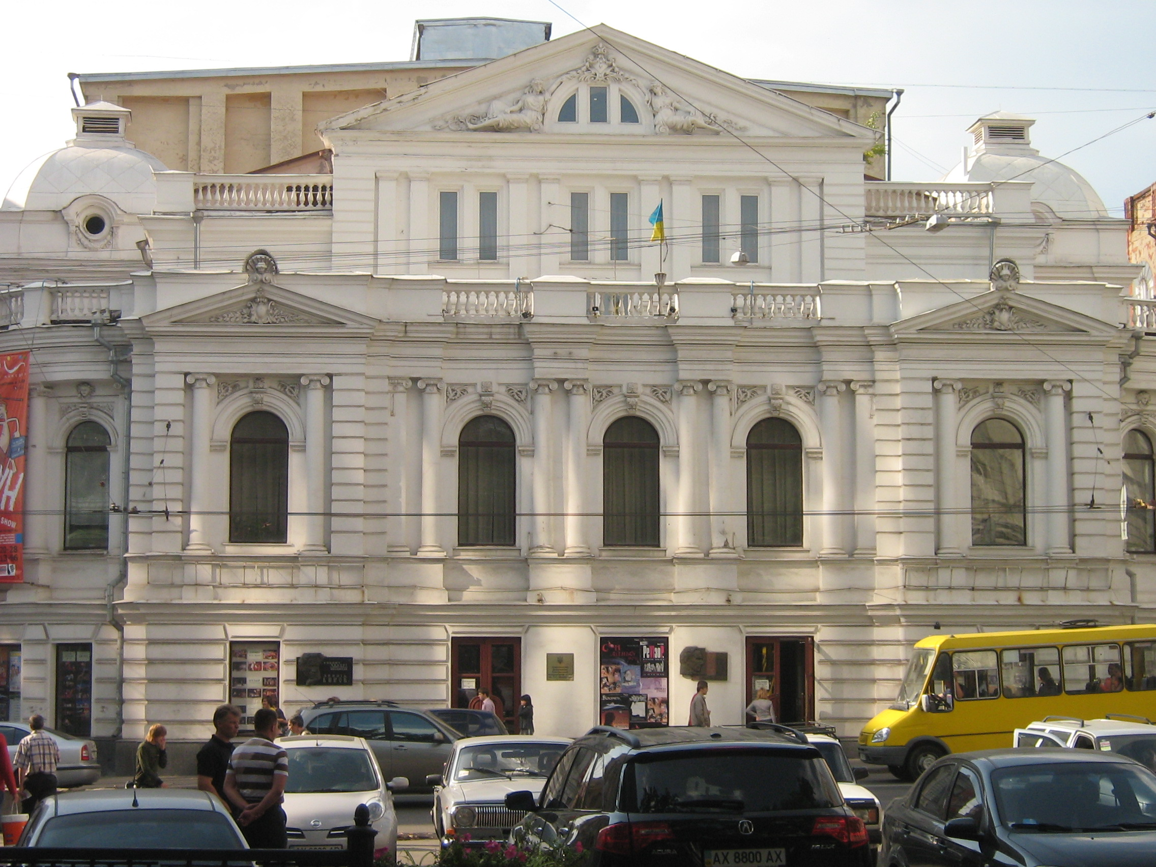 Харьковский государственный академический украинский драматический театр имени Т. Г. Шевченко.